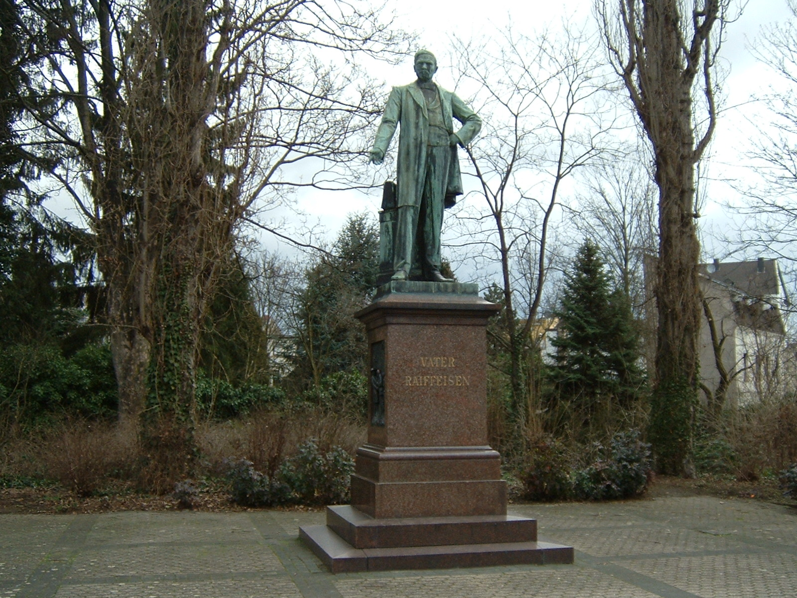 Raiffeisendenkmal Neuwied F.Lang eig.Bild 25.02.07